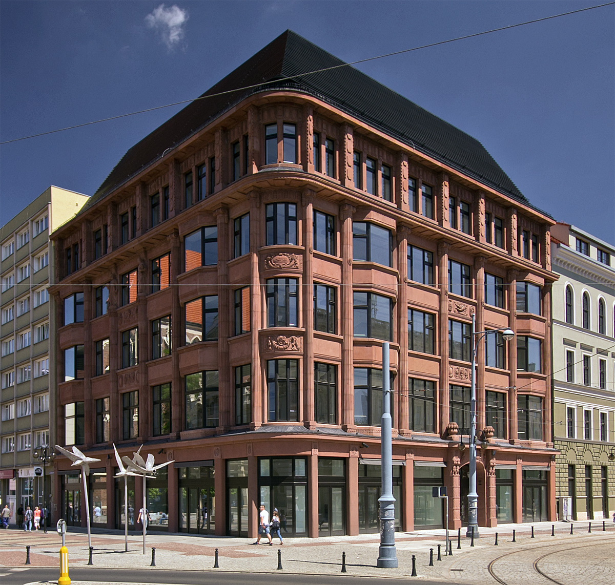 Dawny dom towarowy Juliusa Schottländera we Wrocławiu